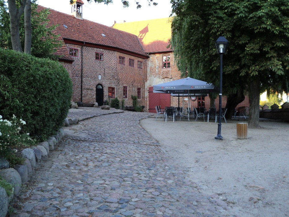 Die alte Burg Penzlin, Innenhofansicht